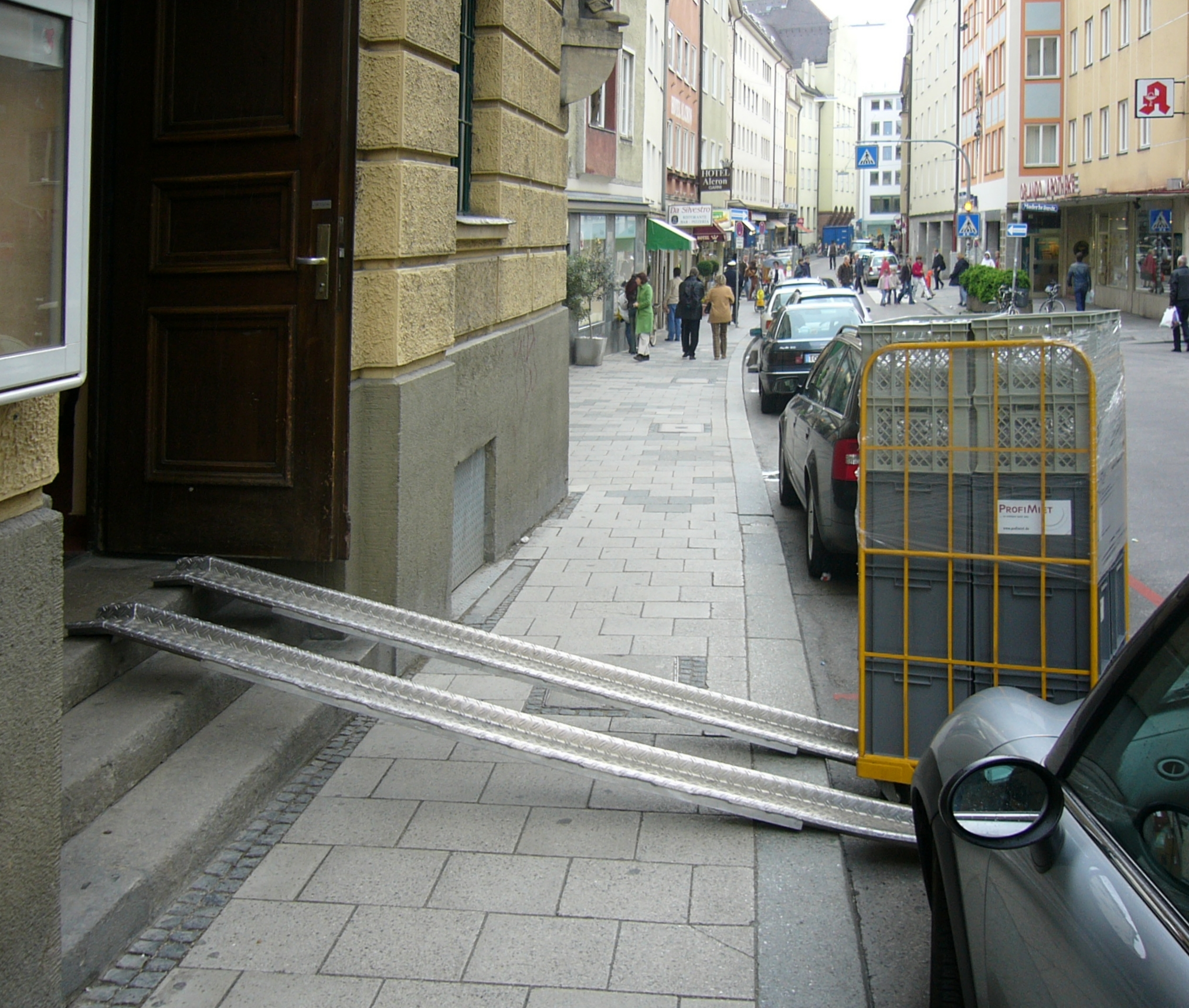 Rollschienen ohne Fixierung